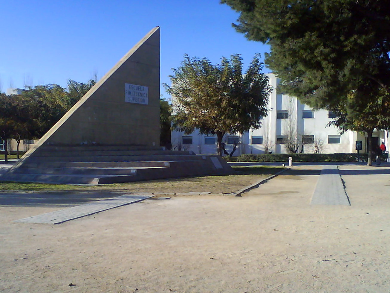 Reloj de sol junto al edificio de la Escuela Politécnica Superior I de la Universidad de Alicante (España)